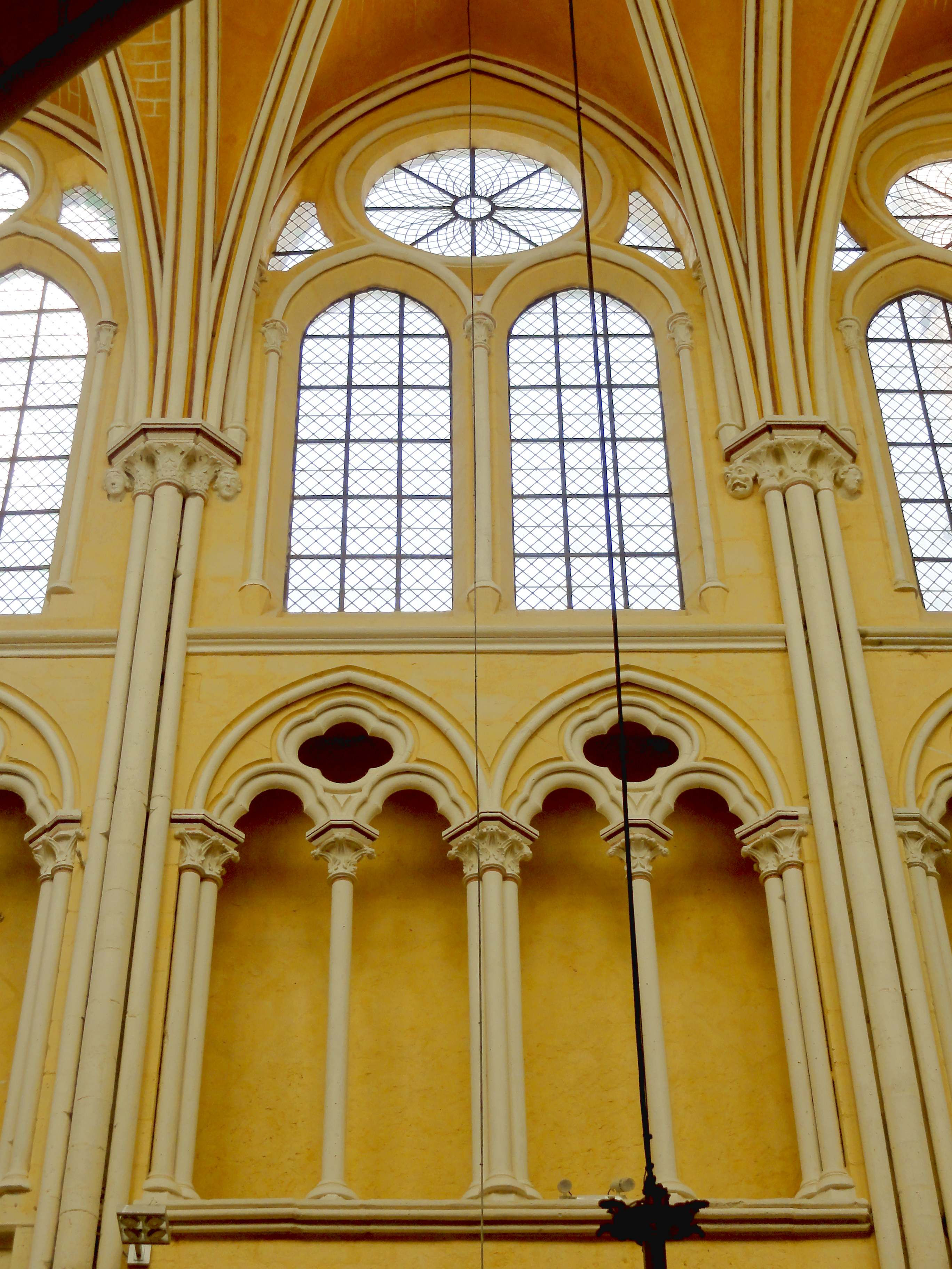 Voir titre.